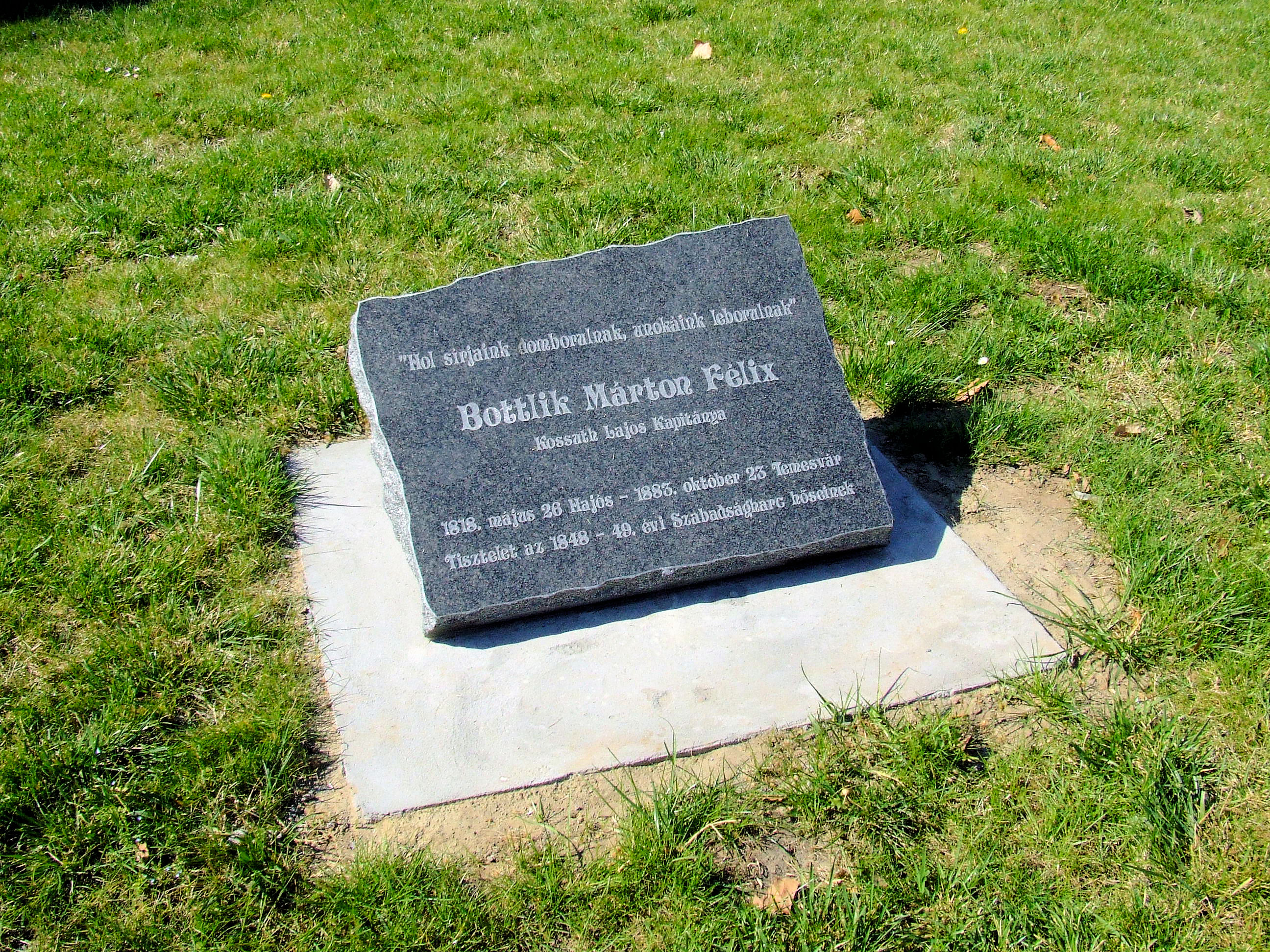 Bottlik János Félix (1818–1883) hajósi születésű honvédtiszt (a titeli sajkás zászlóalj hadnagya, majd a szabadságharcban a péterváradi utászosztály századosa) emléktáblája Hajóson